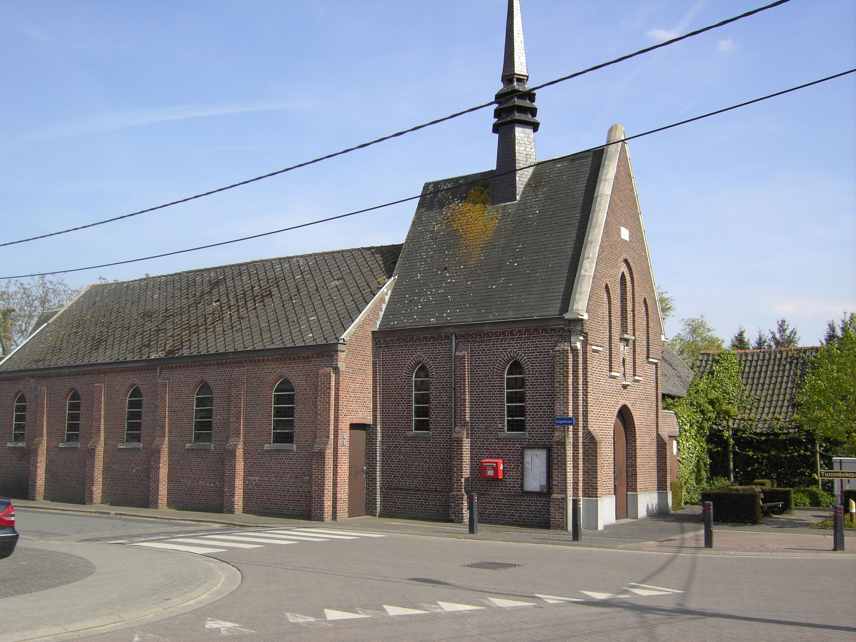 Sint-Jozefskapel - hoek Bruinbekestraat en Krijgelstraat - Bruinbeke - Schellebelle - Wichelen - Oost-Vlaanderen - Vlaanderen - België